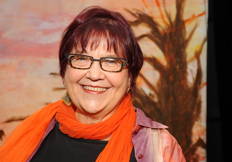 Kaya Ålander